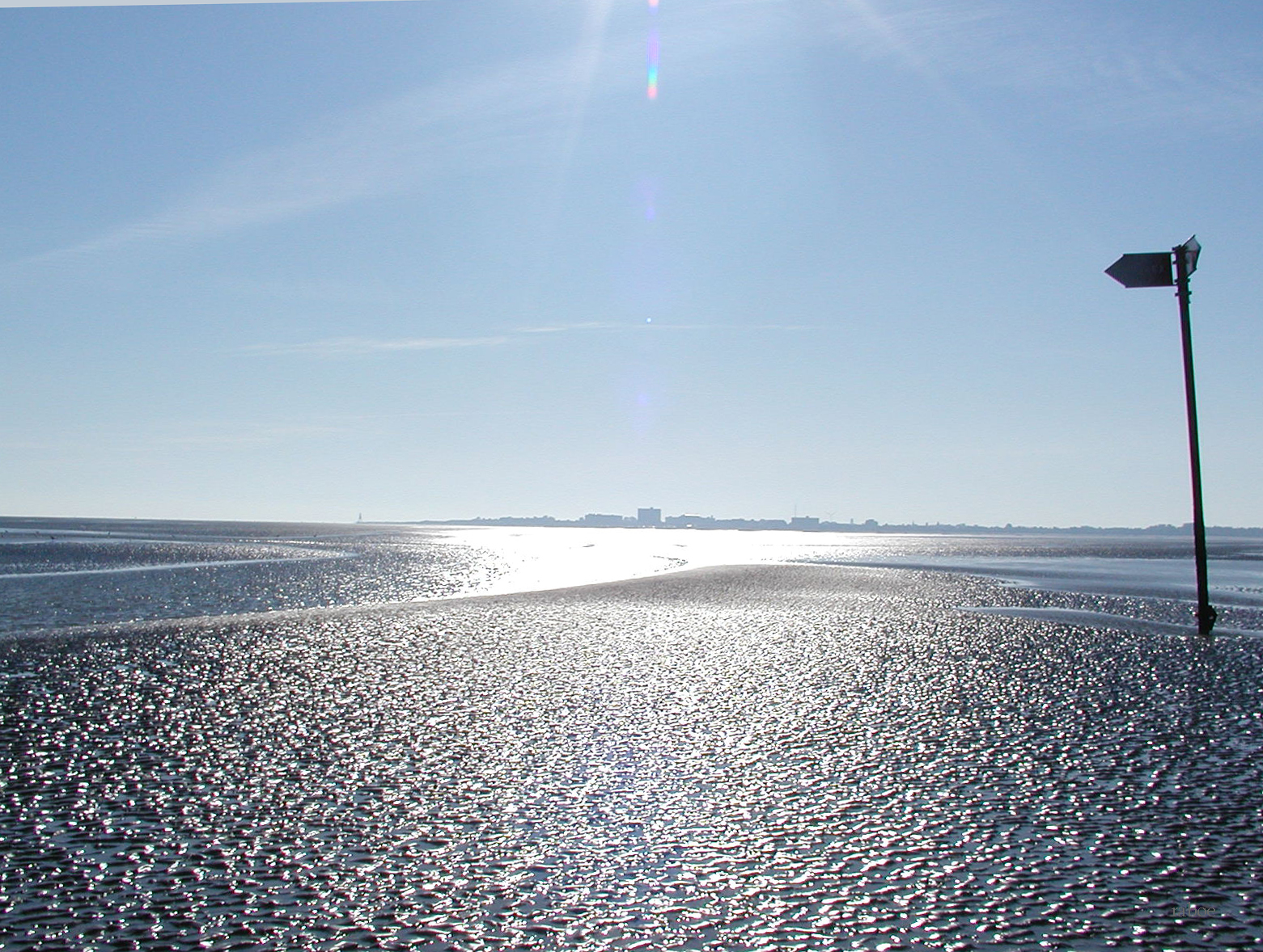 Im Watt bei Dunen, ein Priel und die Küste in der Ferne